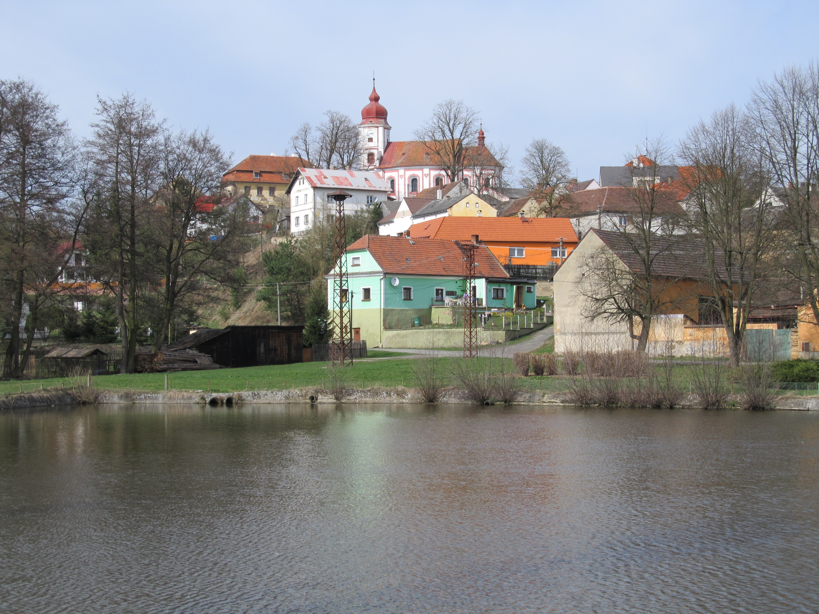 Líšťany